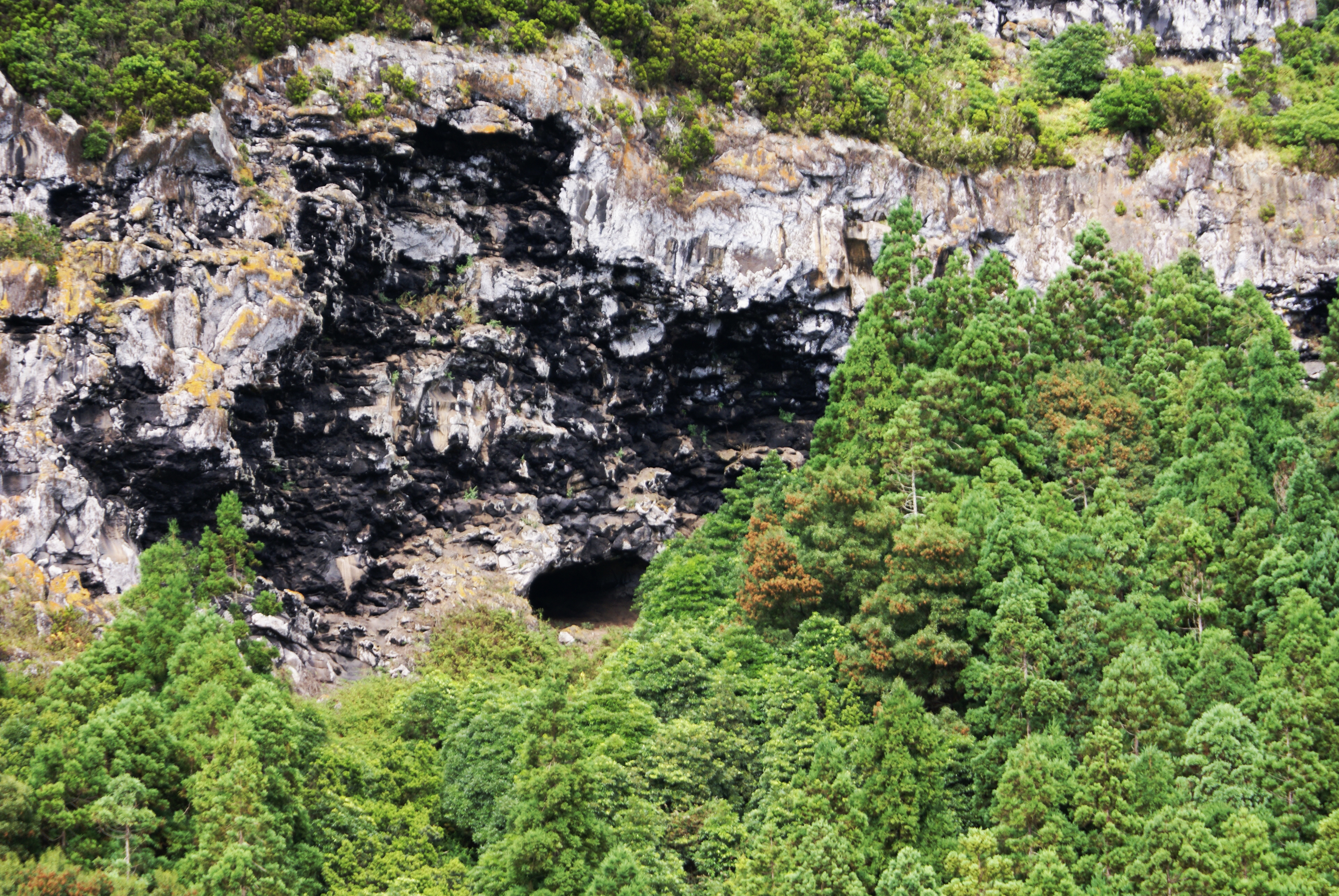 Caldeira da Graciosa, vista do Miradouro 3, Santa Cruz da Graciosa, Açores, Portugal